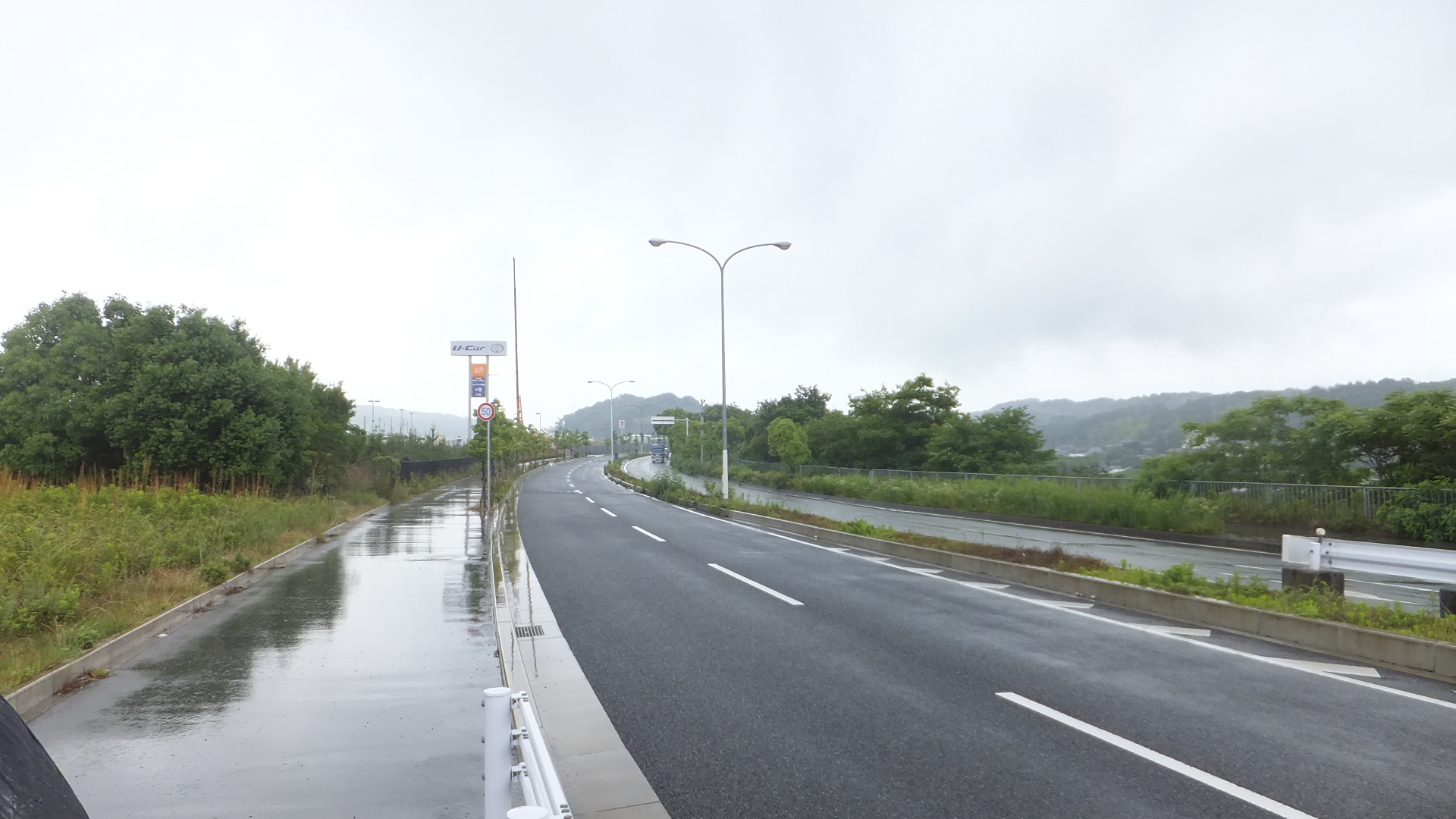 兵庫県神戸市西区見津が丘3丁目 兵庫県道22号神戸三木線